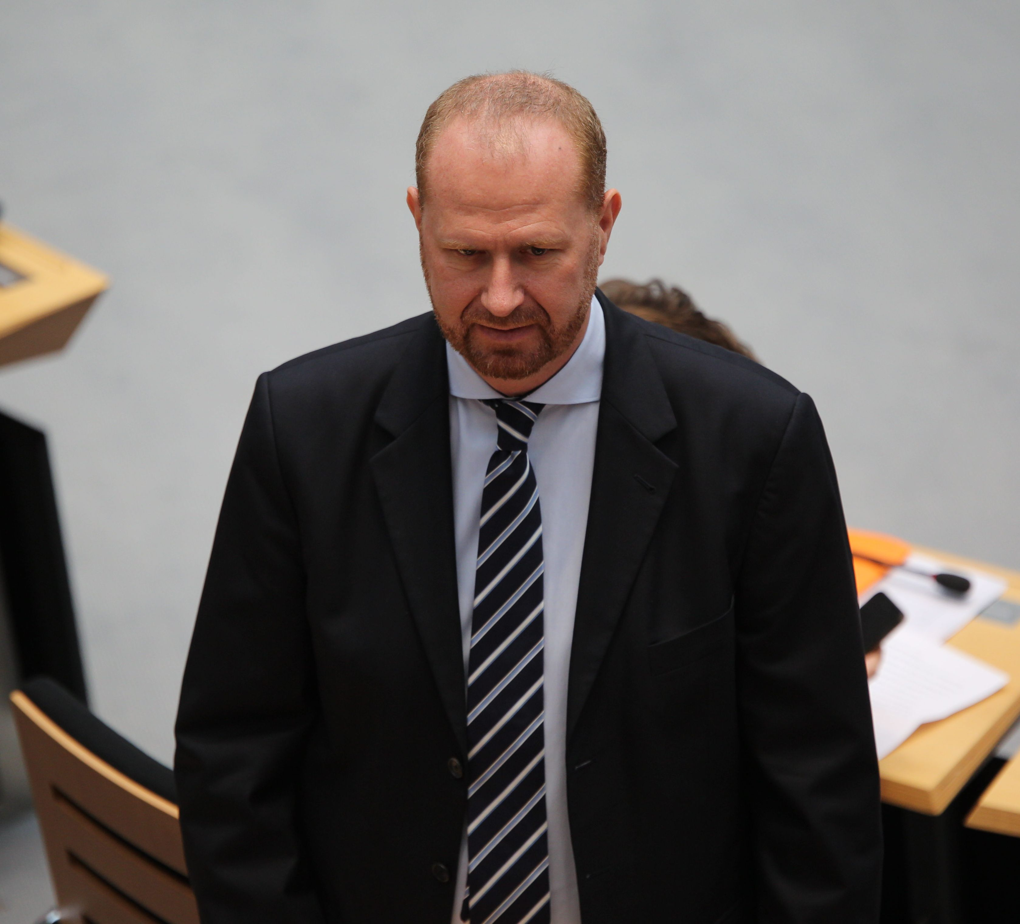 Michael Dietmann während der Plenarsitzung des Berliner Abgeordnetenhauses am 8. Dezember 2016